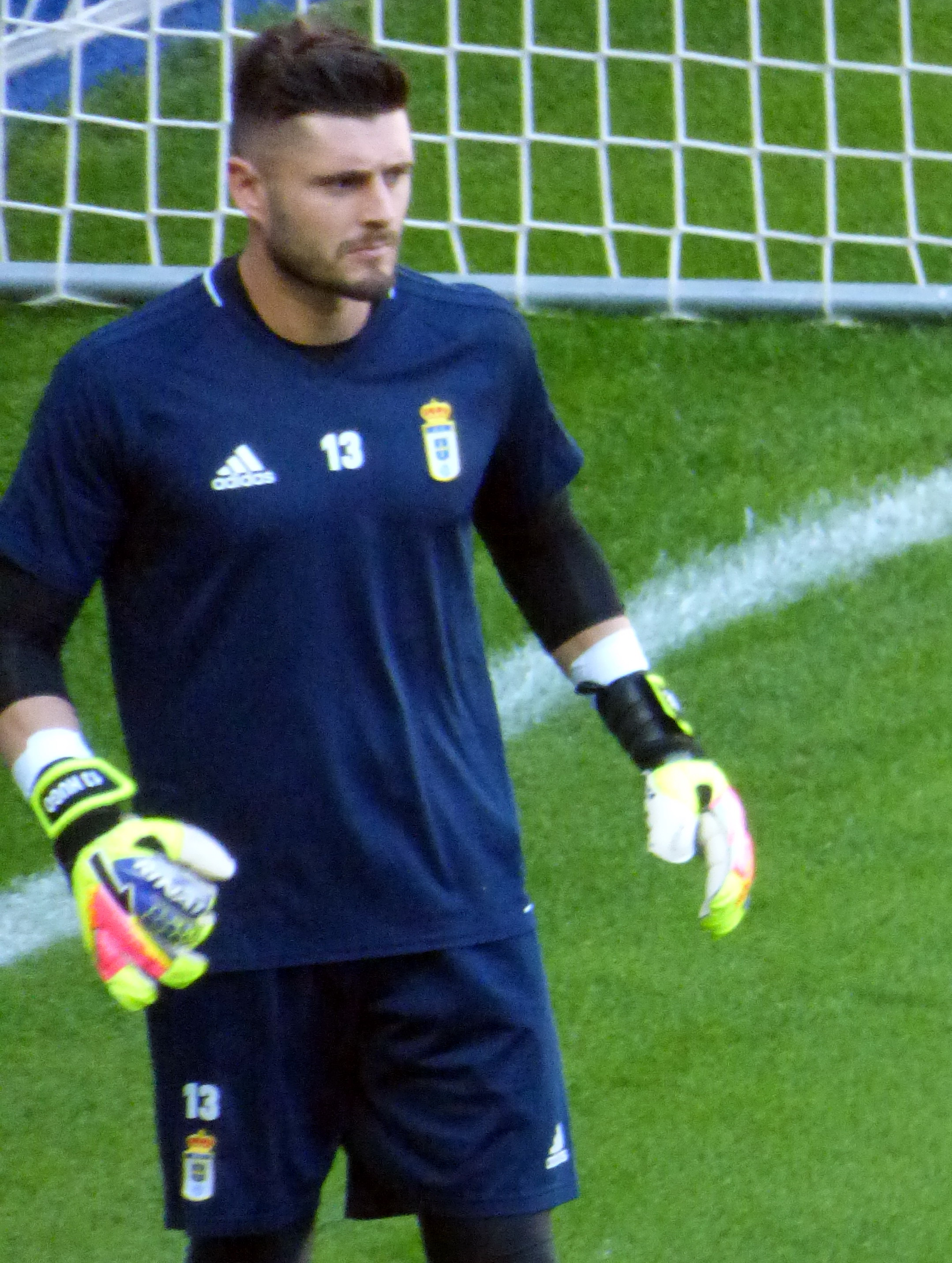 Juan Carlos Sánchez durante un calentamiento en el Carlos Tartiere de Oviedo, en Agosto de 2017